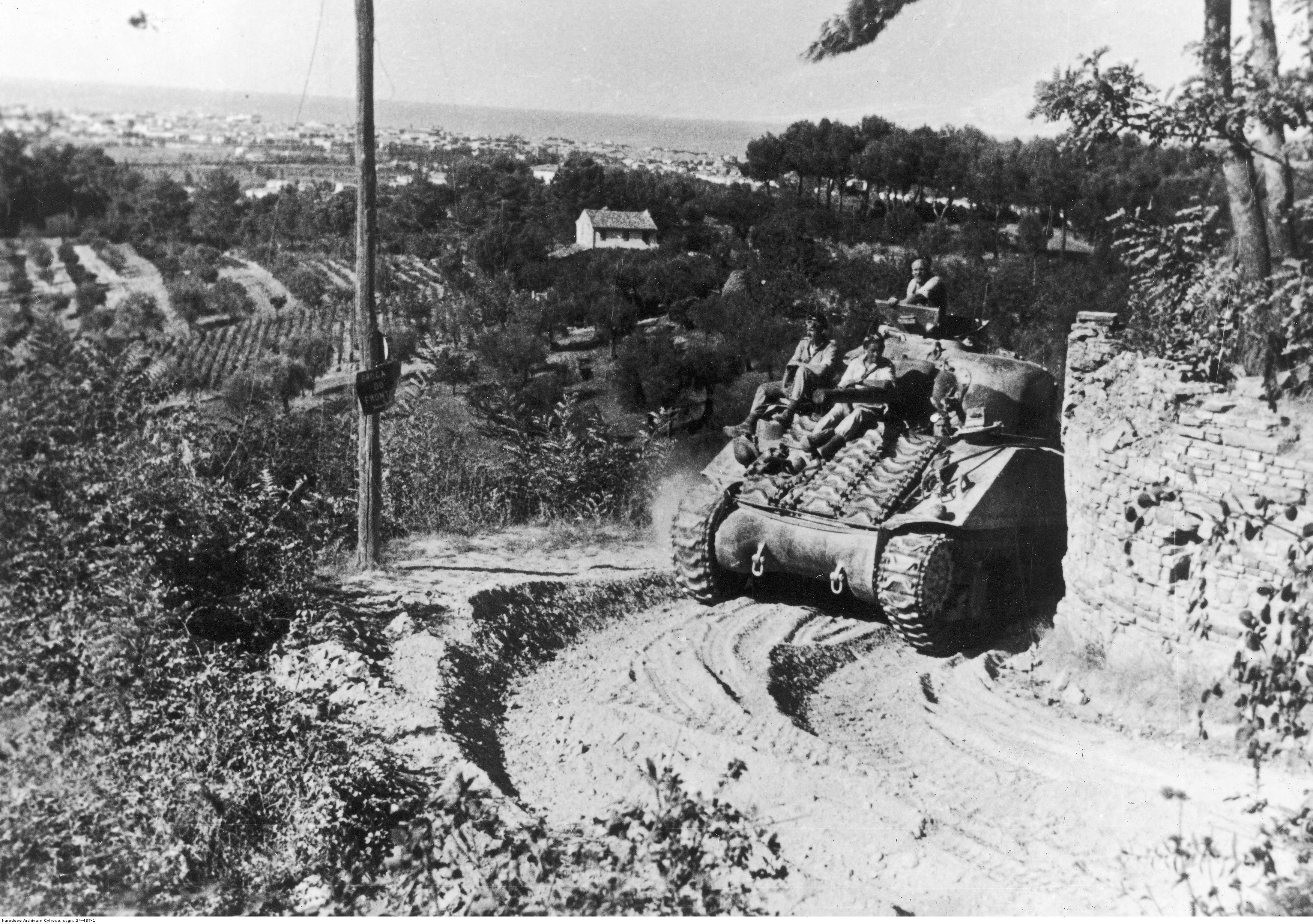 Zdobycie miasta Pesaro przez żołnierzy 2 Korpusu Polskiego podczas walkach na Linii Gotów; 29 sierpnia 1944. Czołgi M4 Sherman 1 Pułku Ułanów Krechowieckich po przełamaniu niemieckich pozycji na Linii Gustawa. W tle miasto Pesaro. Archiwum Fotograficzne Tadeusza Szumańskiego. Sygnatura: 24-487-1